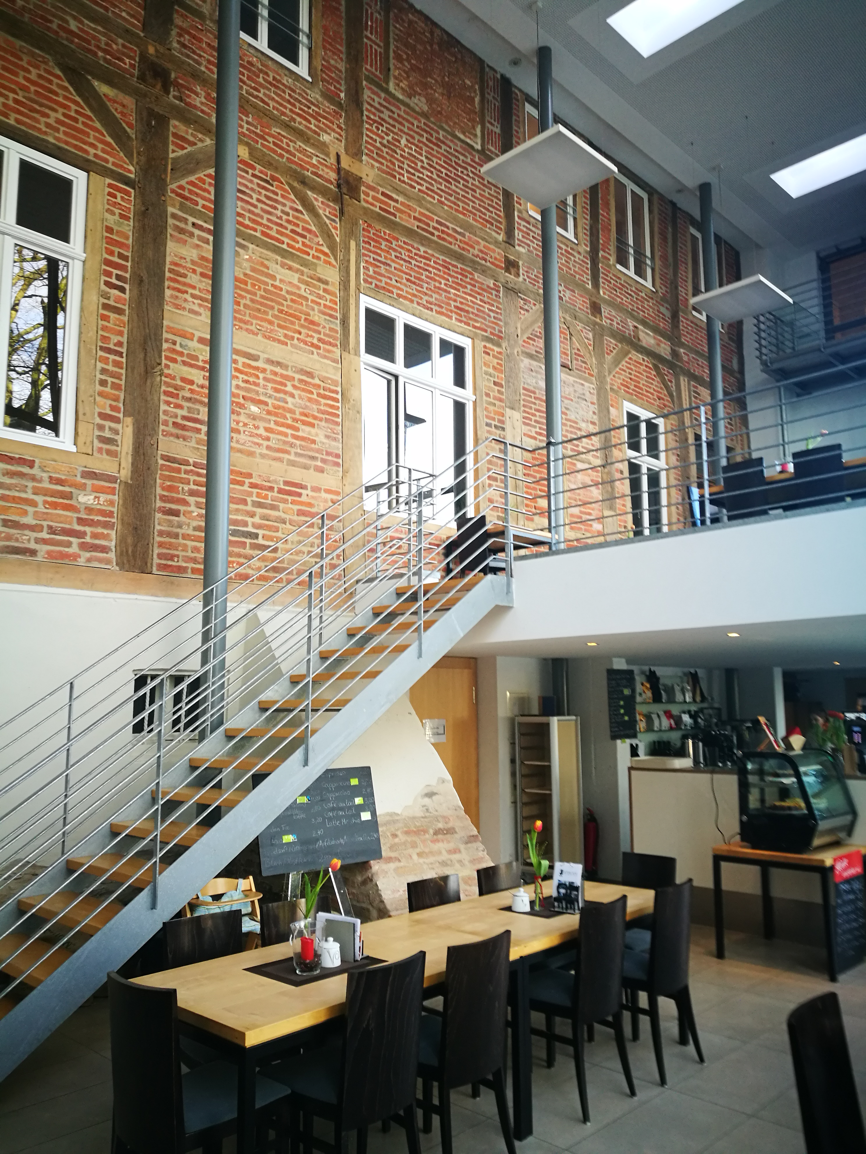 Heinrich Neuy Museum